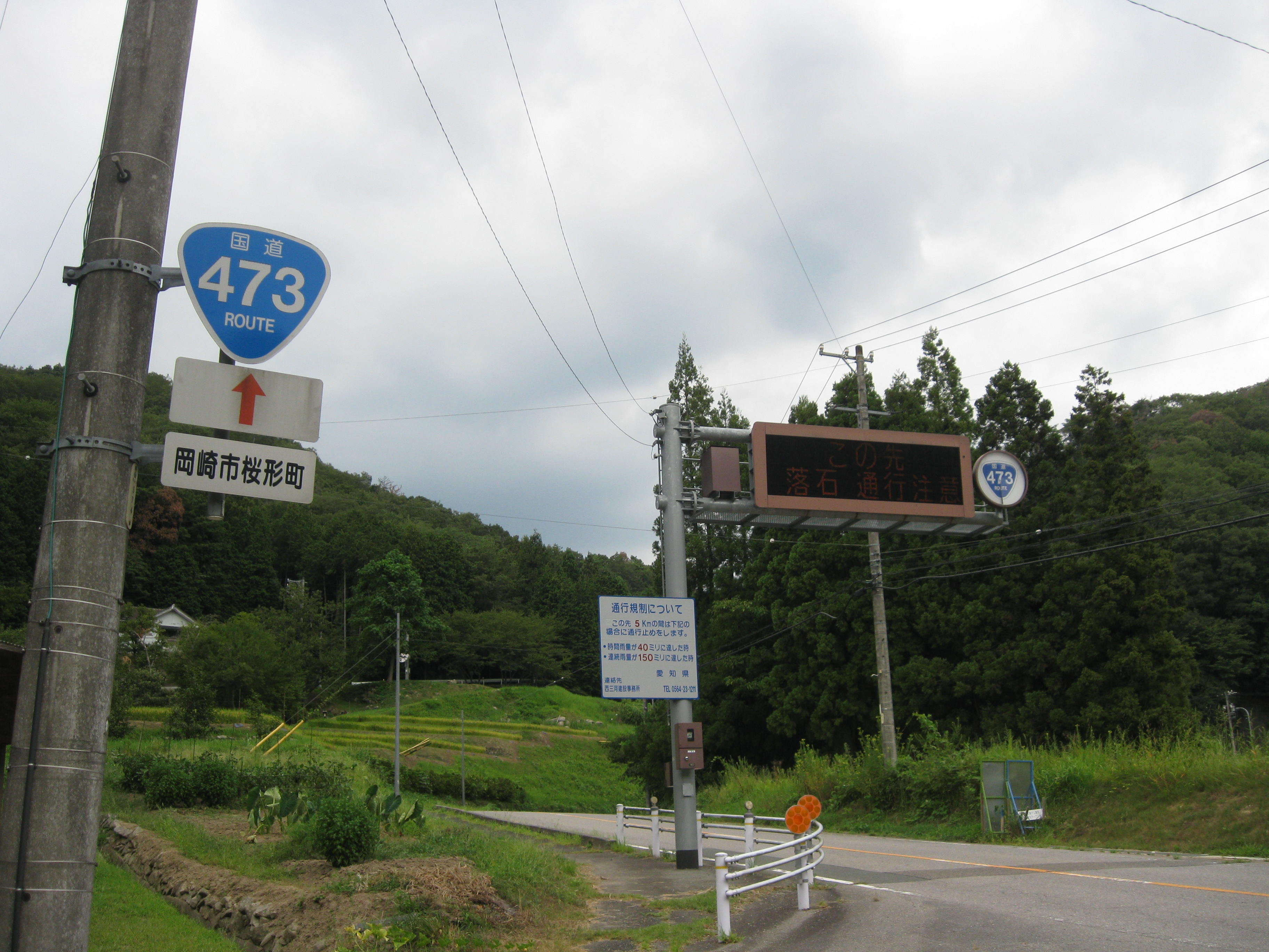 愛知県岡崎市桜形町にて撮影